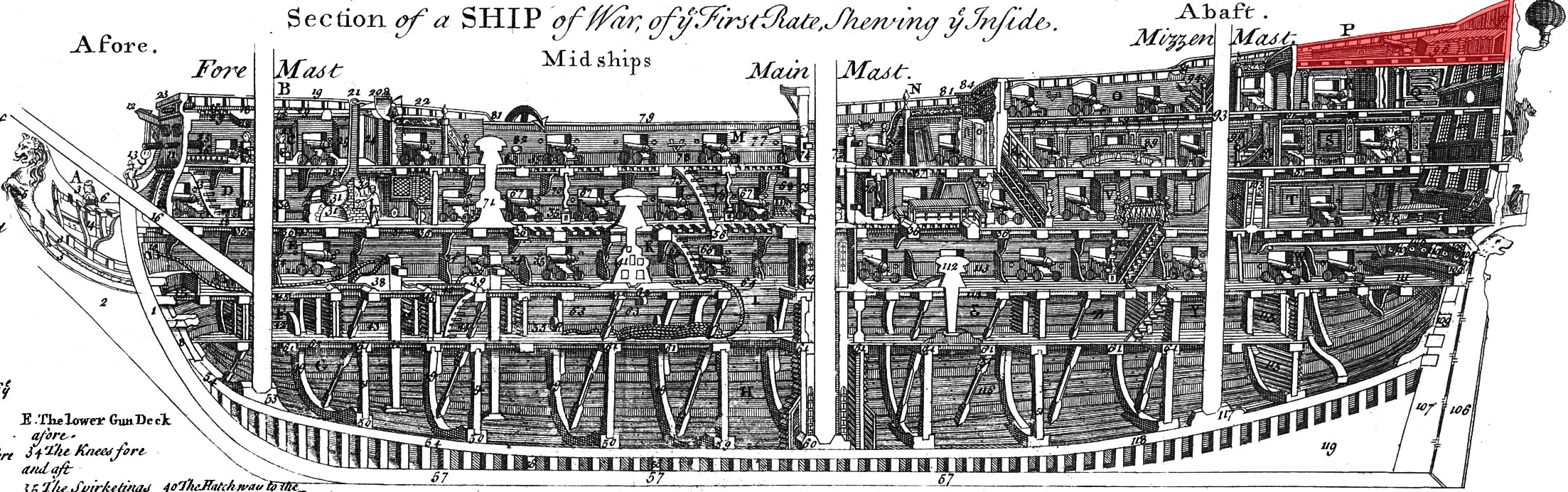 Poop-Deck auf einem Linienschiff (rot eingefärbt)